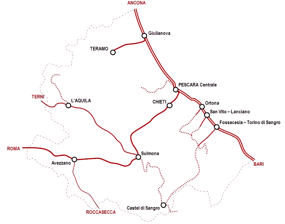 Mappa della rete ferroviaria abruzzese aggiornata al 2015.